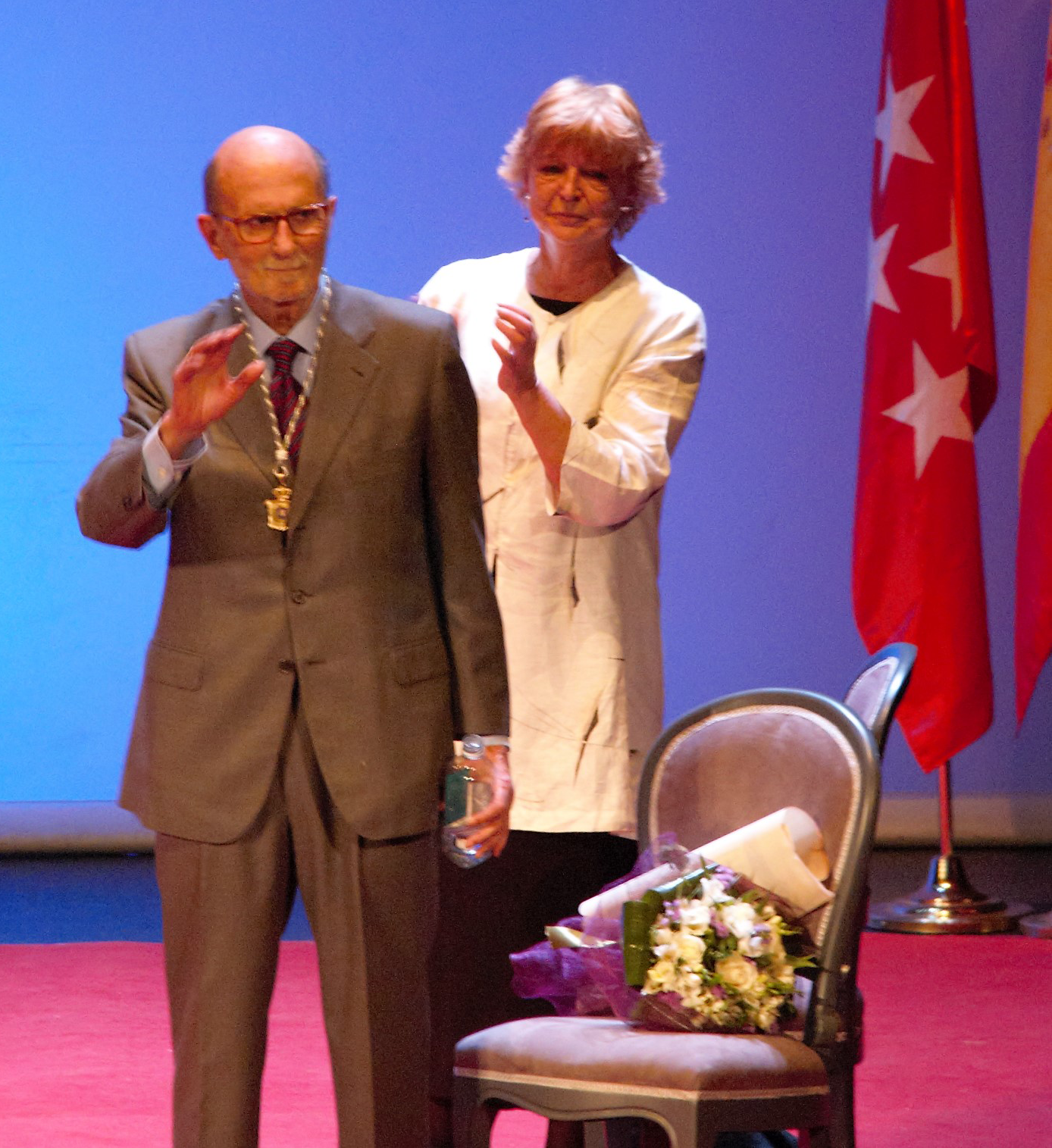 Pilar Revilla Bel y Arsenio Lope Huerta en el acto donde recibió la Medalla de oro de la ciudad de Alcalá de Henares (Comunidad de Madrid - España) el 27 de febrero de 2020 en el Teatro Salón Cervantes.